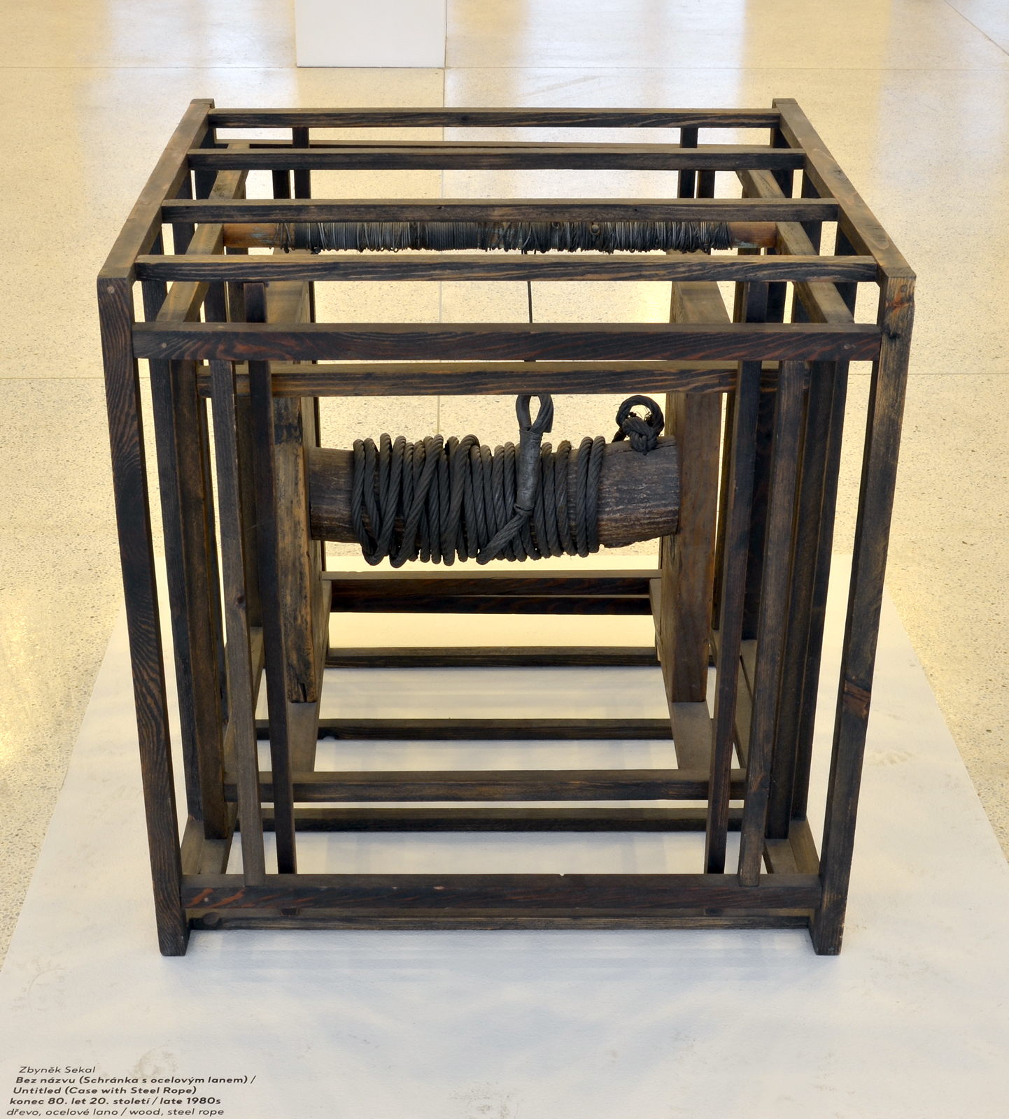 Zbyněk Sekal, Bez názvu (schránka s ocelovým lanem), konec 80. let